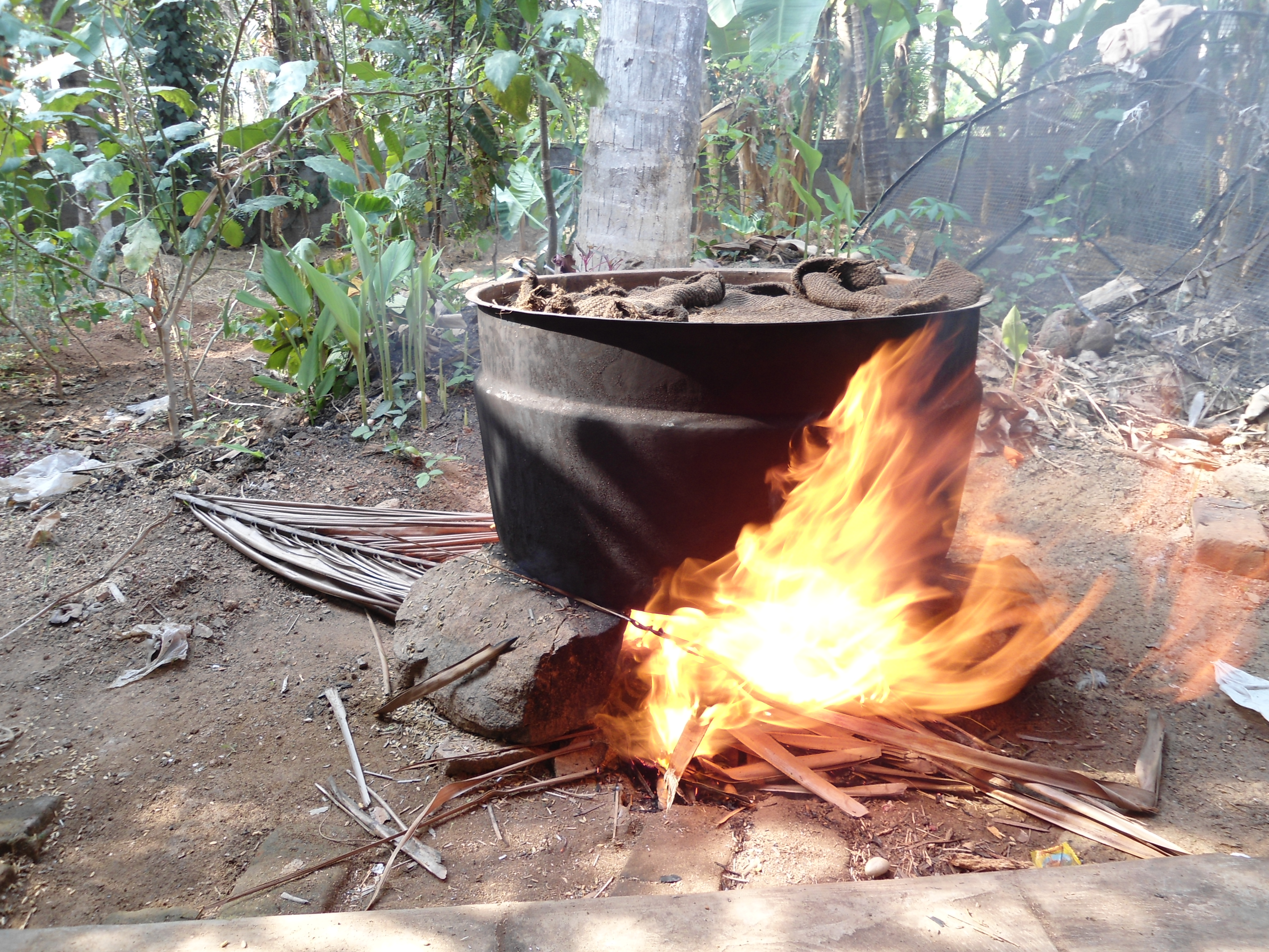 ചെമ്പിലെ നെല്ല് പുഴുങ്ങല്‍, കേരളം, തൃശ്ശൂര്‍